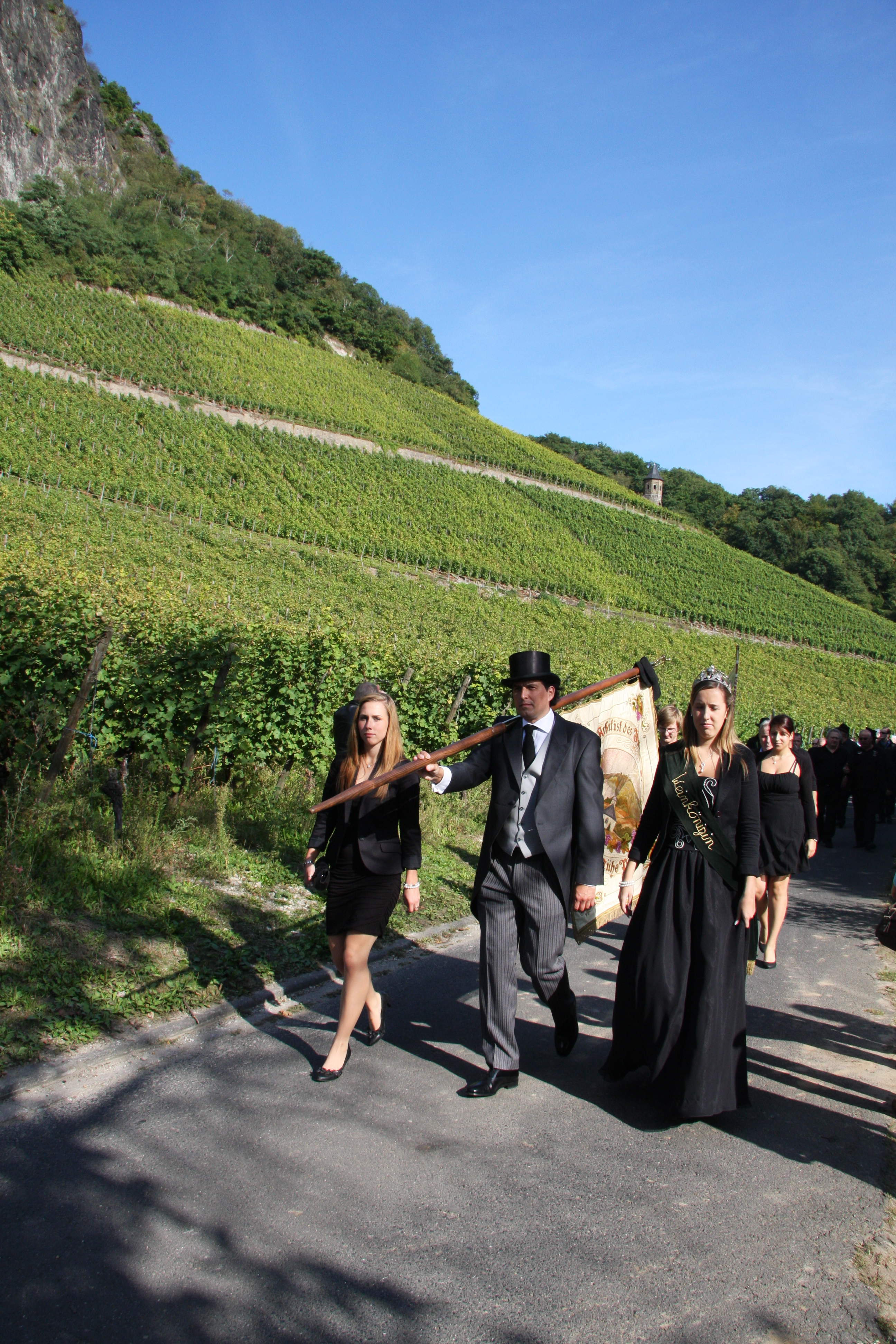 Trauerzug unterm Siegfriedfelsen als Mahnwache für 1000 Tage Weinbergswegsperrung, veranstaltet vom Bürger- und Ortsverein Rhöndorf, und Demonstration für eine Aufhebung des Betretungsverbots der Mitarbeiter der Rhöndorfer Weinbaubetriebe, Am Domstein, Rhöndorf, Bad Honnef